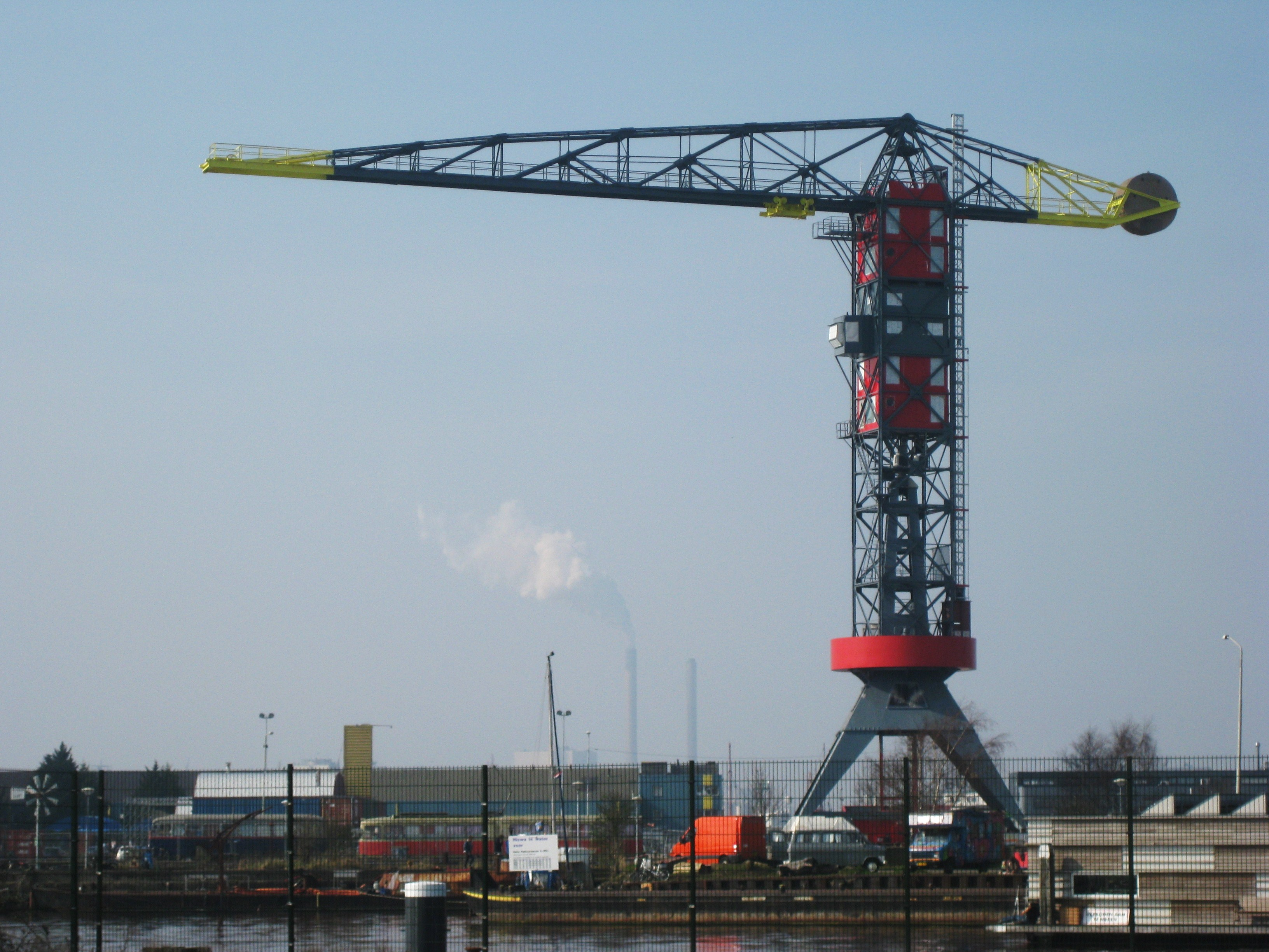 Het Faralda NDSM Crane Hotel op het NDSM terrein in Amsterdam-Noord